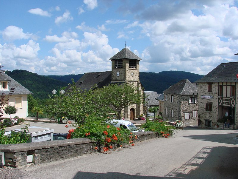 Village de Saint-Hilaire-Peyroux, Corrèze, France